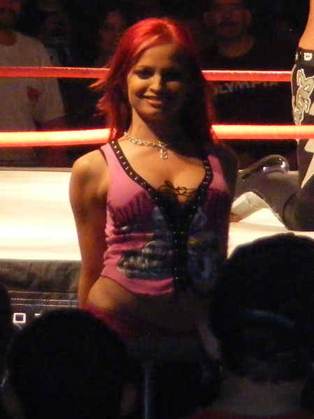 Una foto de la Knockout Hemme